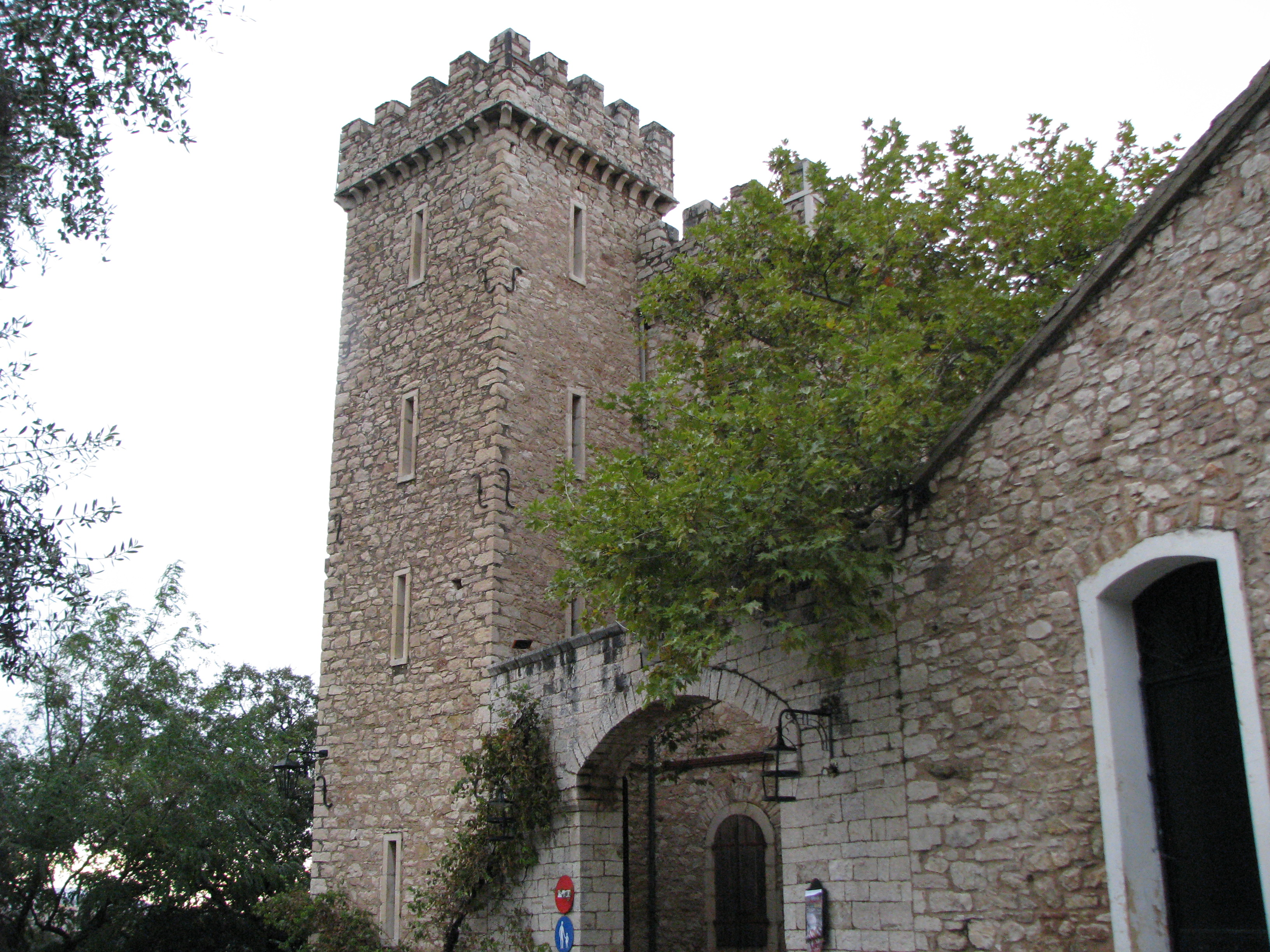 Οινοποιείο ΑΧΑΪΑ ΚΛΑΟΥΣ«Οινοποιείο ΑΧΑΪΑ ΚΛΑΟΥΣ»